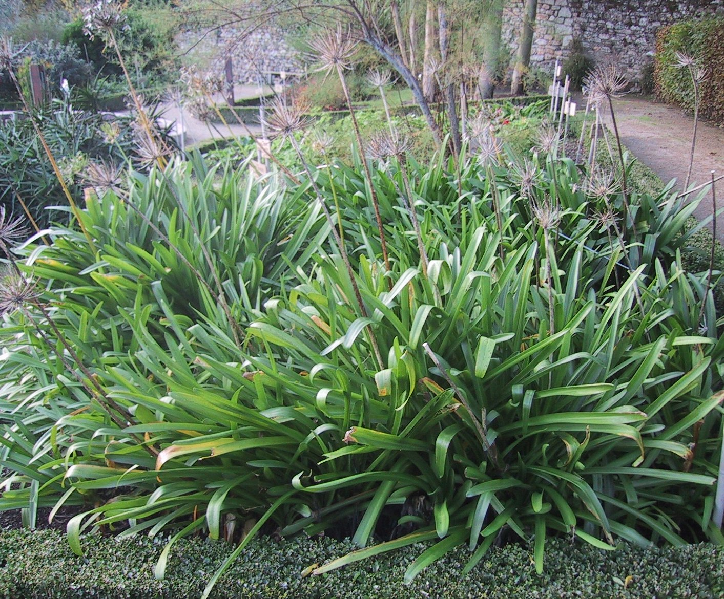 Agapanthus praecox liliaceae